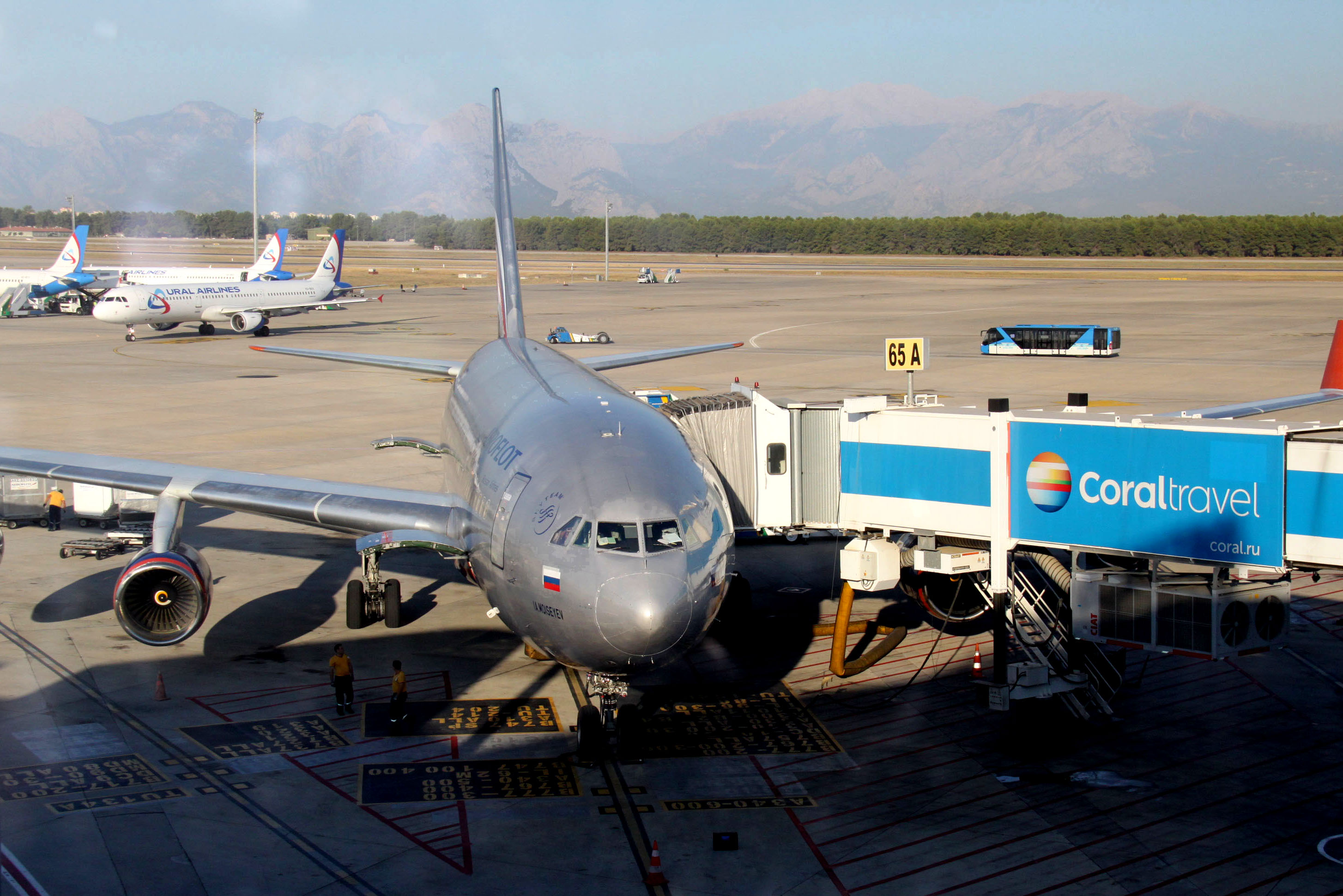 Ил-96-300 RA-96008 Аэрофлота перед посадкой пассажиров в Анталии